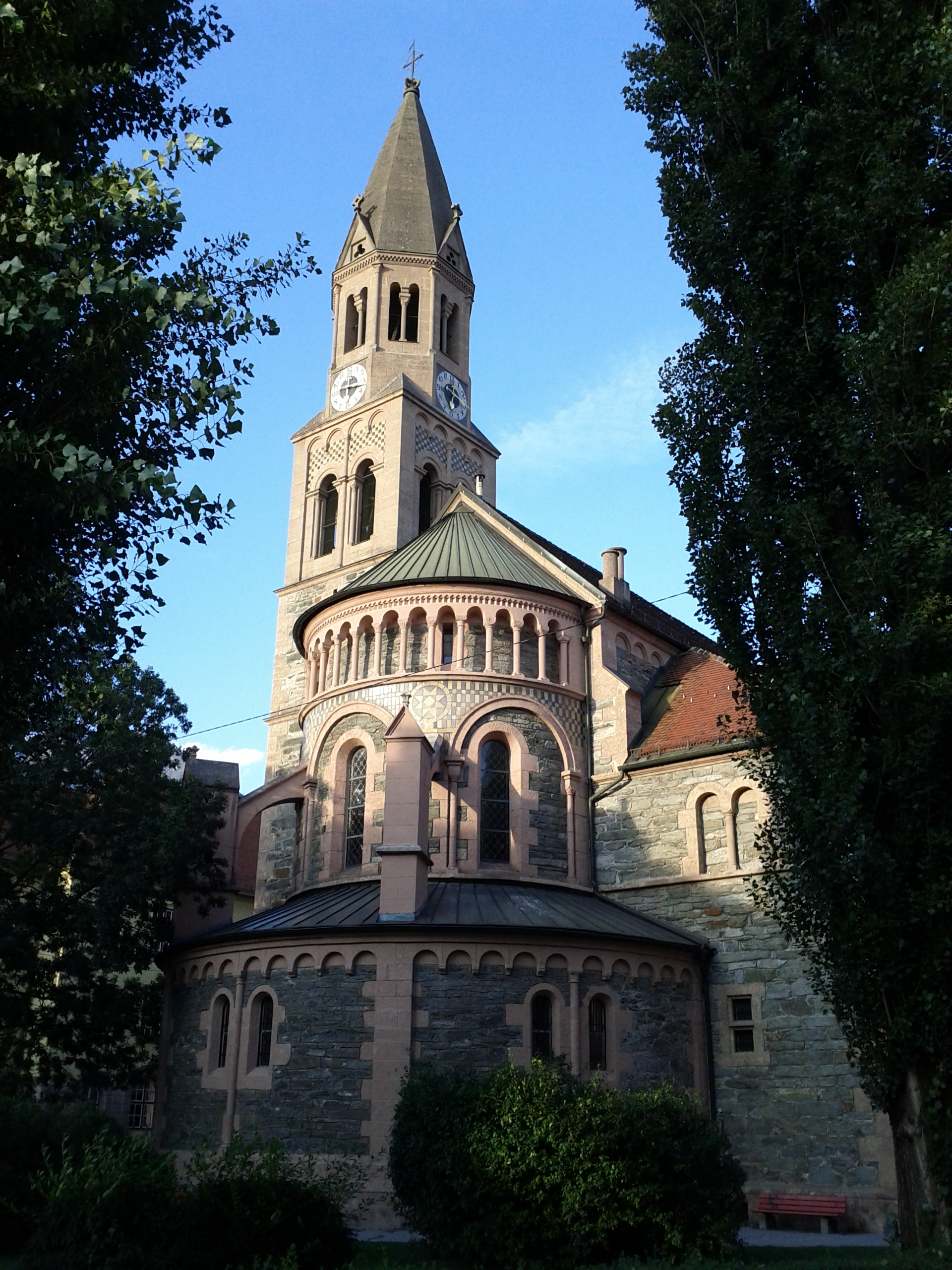 Kath. Pfarrkirche Unserer Lieben Frau Mariä Empfängnis This media shows the remarkable cultural object in the Austrian state of Tyrol listed by the Tyrolean Art Cadastre with the ID 16406. (on tirisMaps, pdf, more images on Commons, Wikidata)